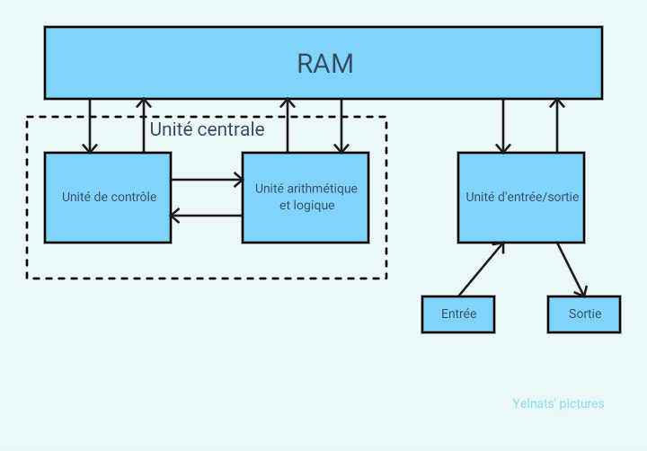 Kreyòl ayisyen : Jeneralman, yon òdinatè konpoze de yon RAM, ki se memwa santral la, yon inite santral de trètman ki gen ladan'l yon inite aritmetik e lojik ak yon inite de kontwòl, e finalman yon inite dantre sòti ki pèmèt echanj avèk mond eksteryè a.